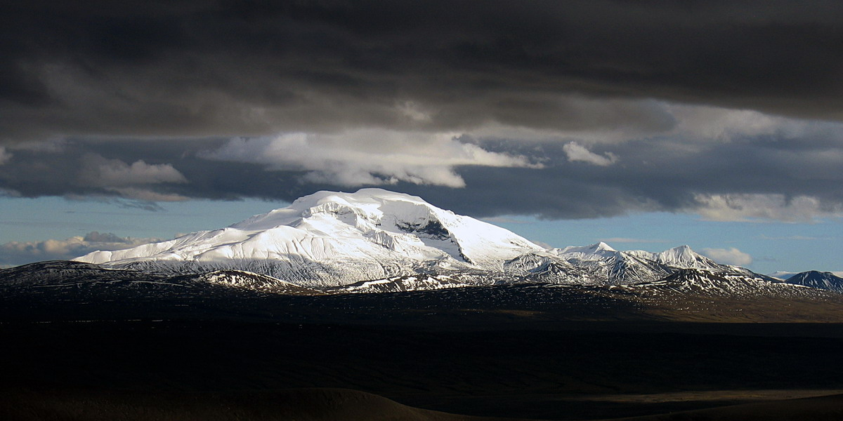 Snæfell séð frá Kárahnjúkum sumarið 2005 - þessi mynd er tekin af mér (is:notandi:oliagust)